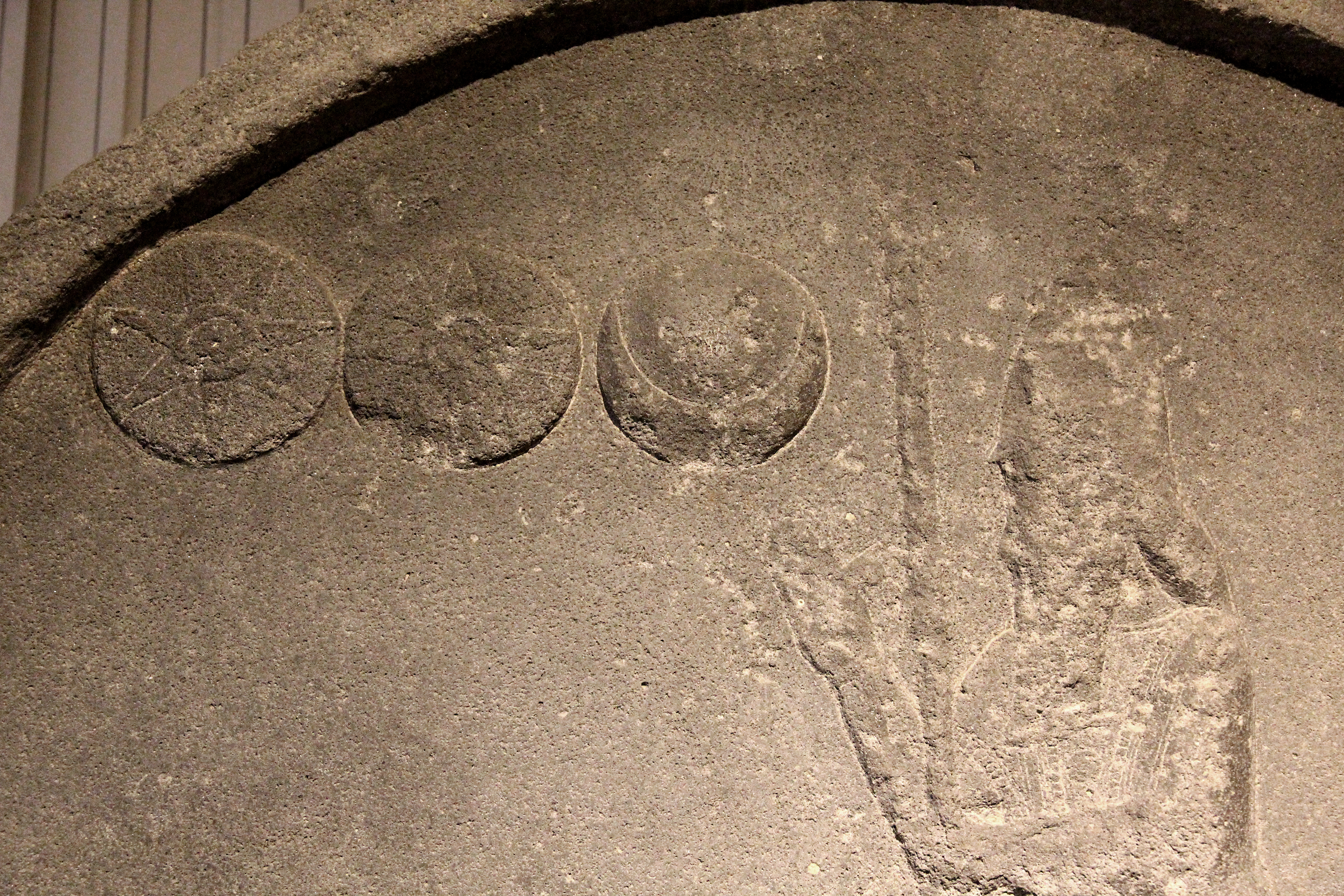 Archäologisches Museum Şanlıurfa, Südosttürkei, Stele des Nabonid aus Harran, Ausschnitt